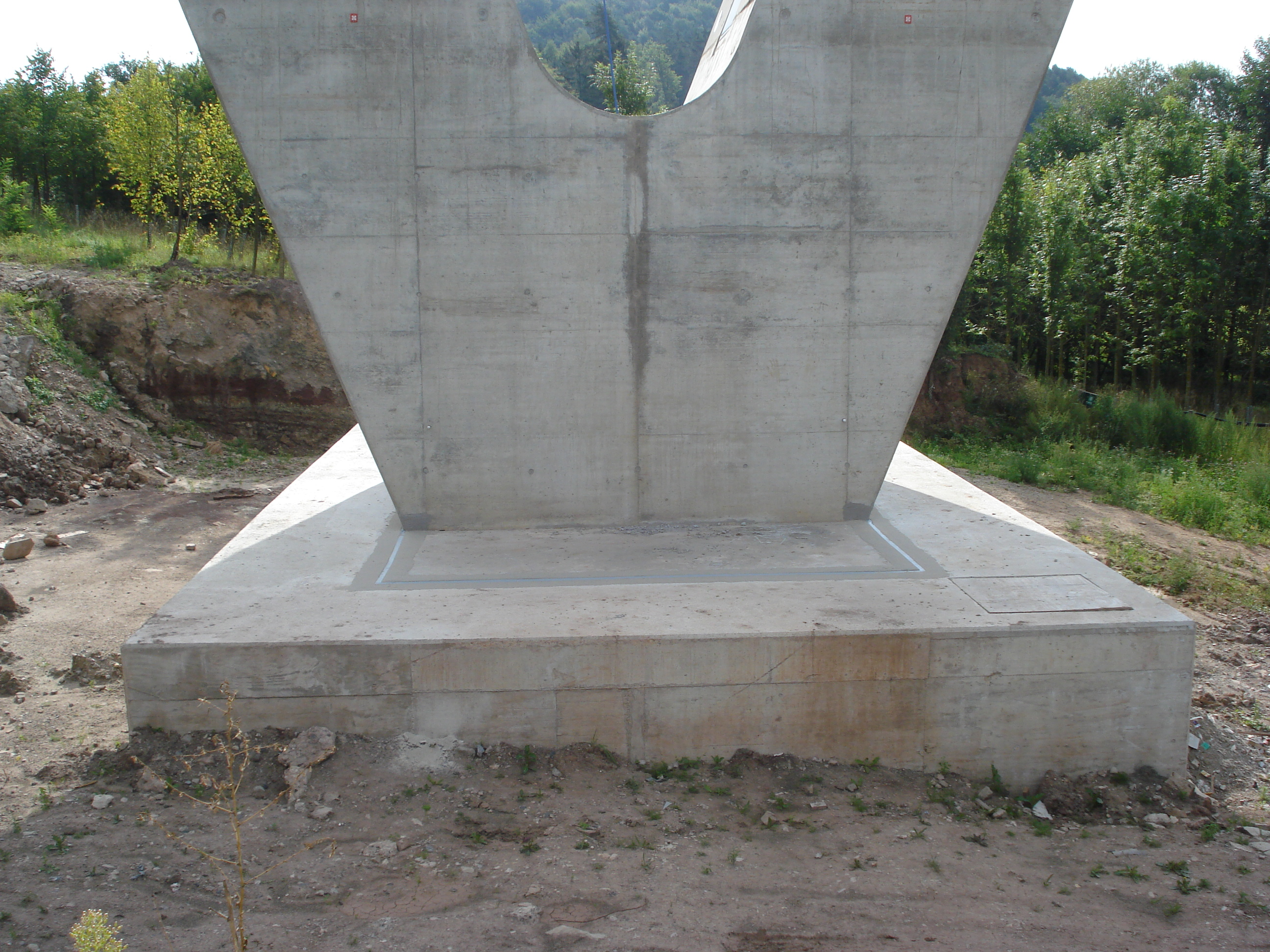 Das Betongelenk an einem der V-Pfeiler der Talbrücke Weißenbrunn am Forst im Endzustand.